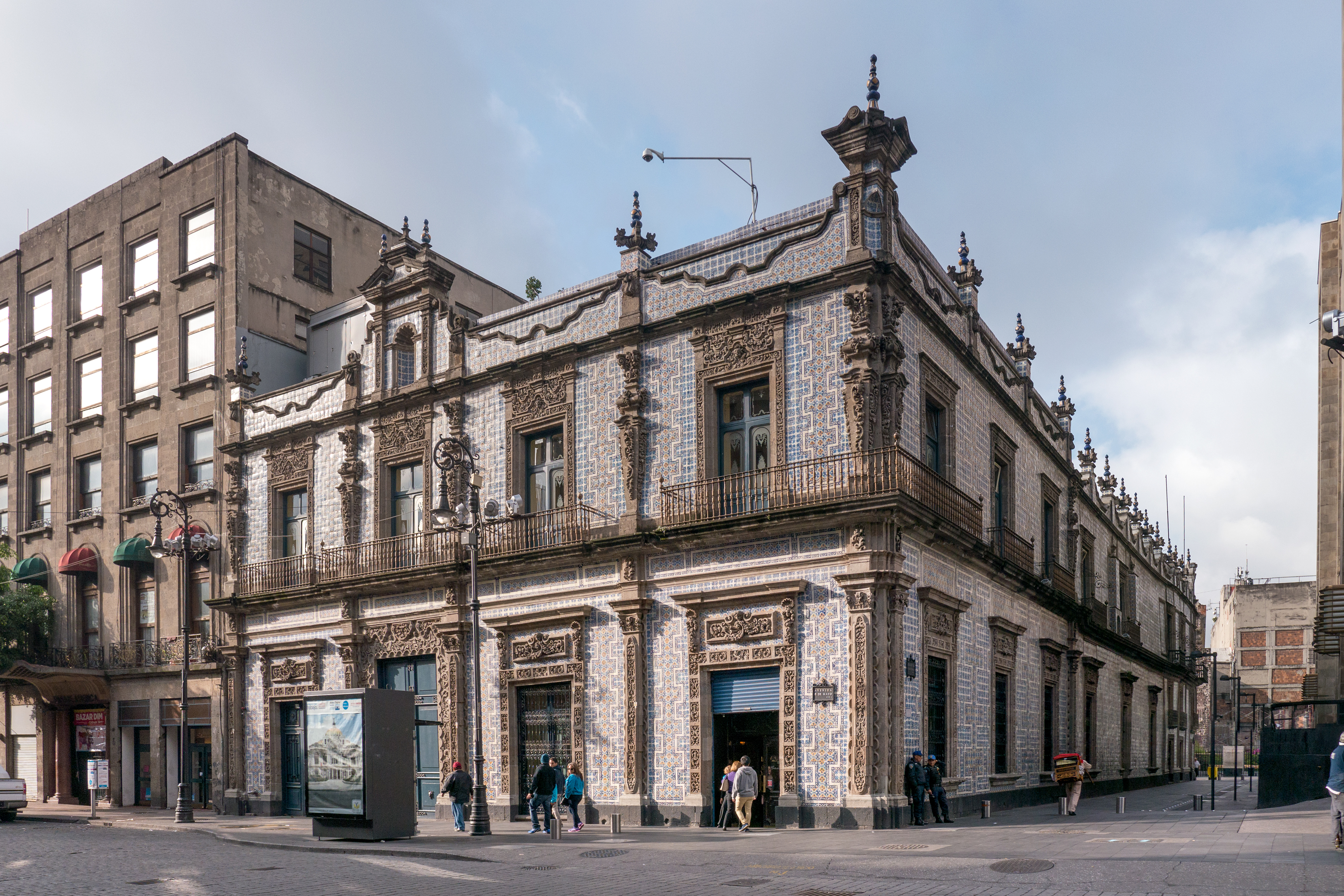 Casa de Azulejos; México city